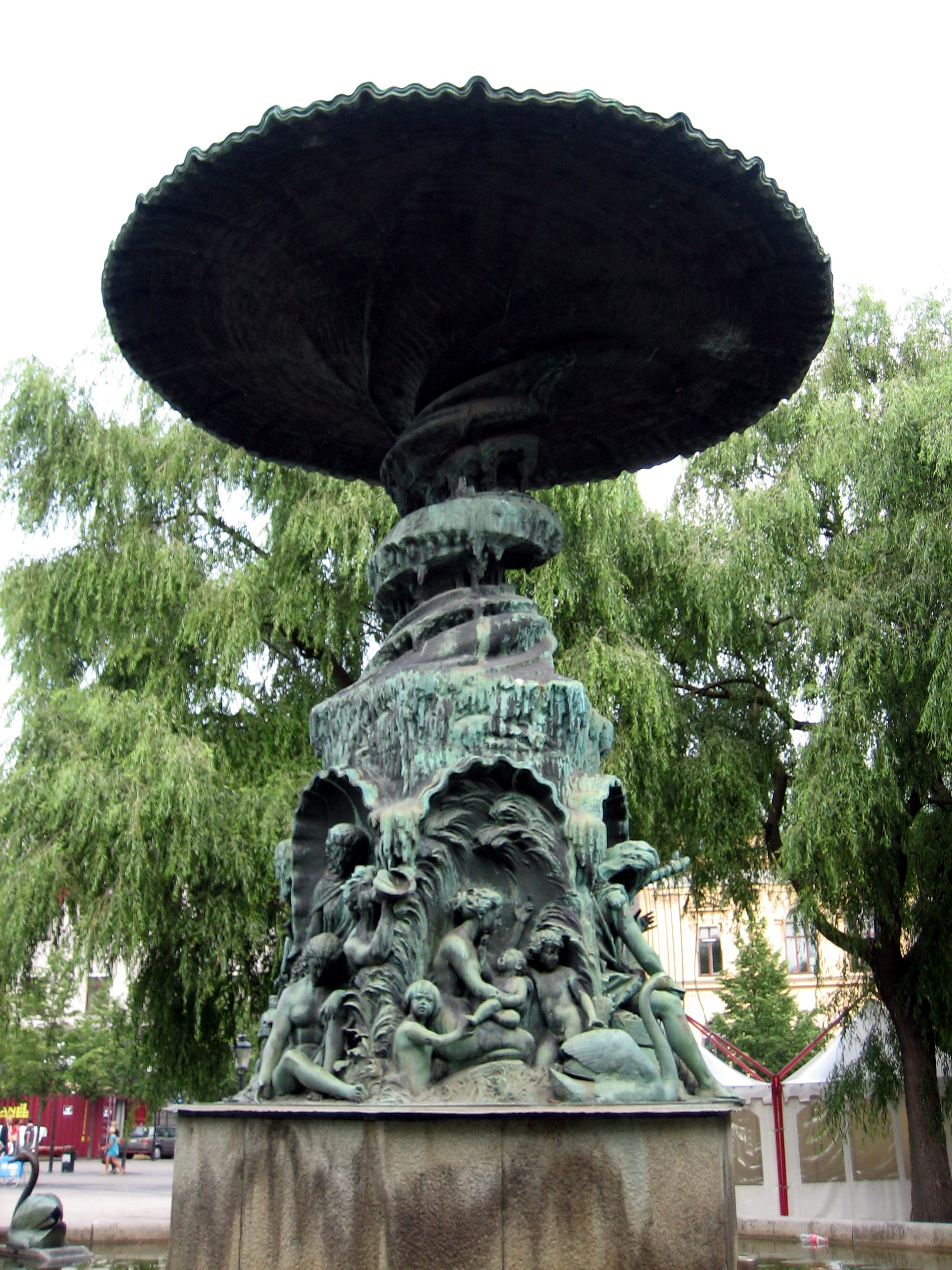 Molins fontän, "Molin's fontain", Kungsträdgården, Stockholm, Sweden